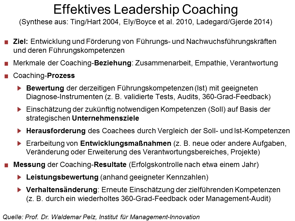 Best Pracitce in Leadership Development